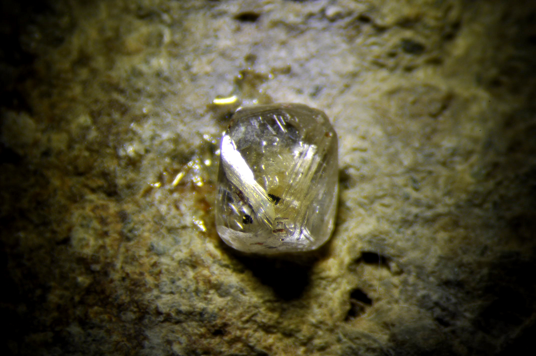 Octaèdre de Diamant sur gangue de Kimberlite